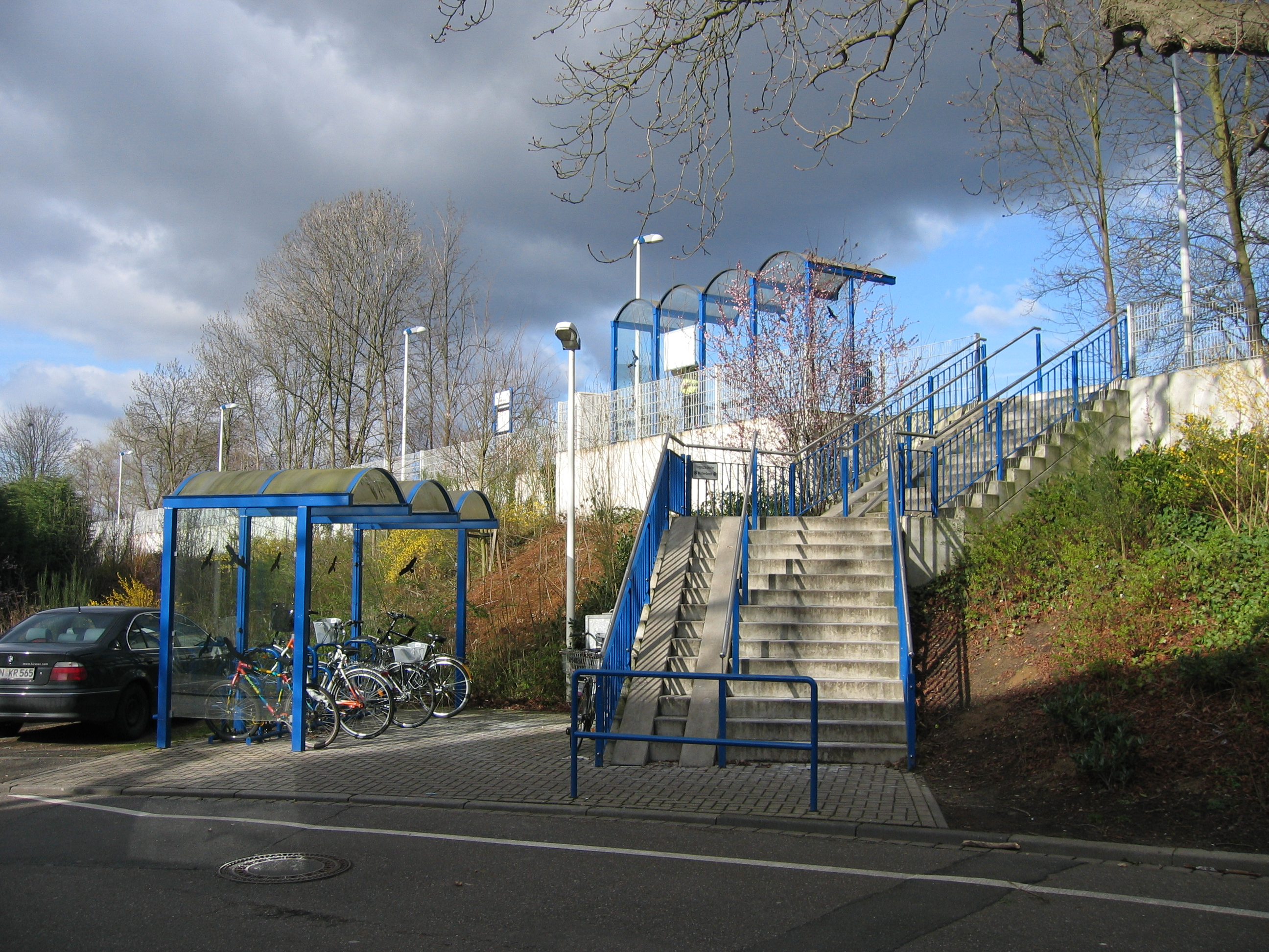 Bahnhof Jülich Nord an der Bahnstrecke Jülich–Dalheim.